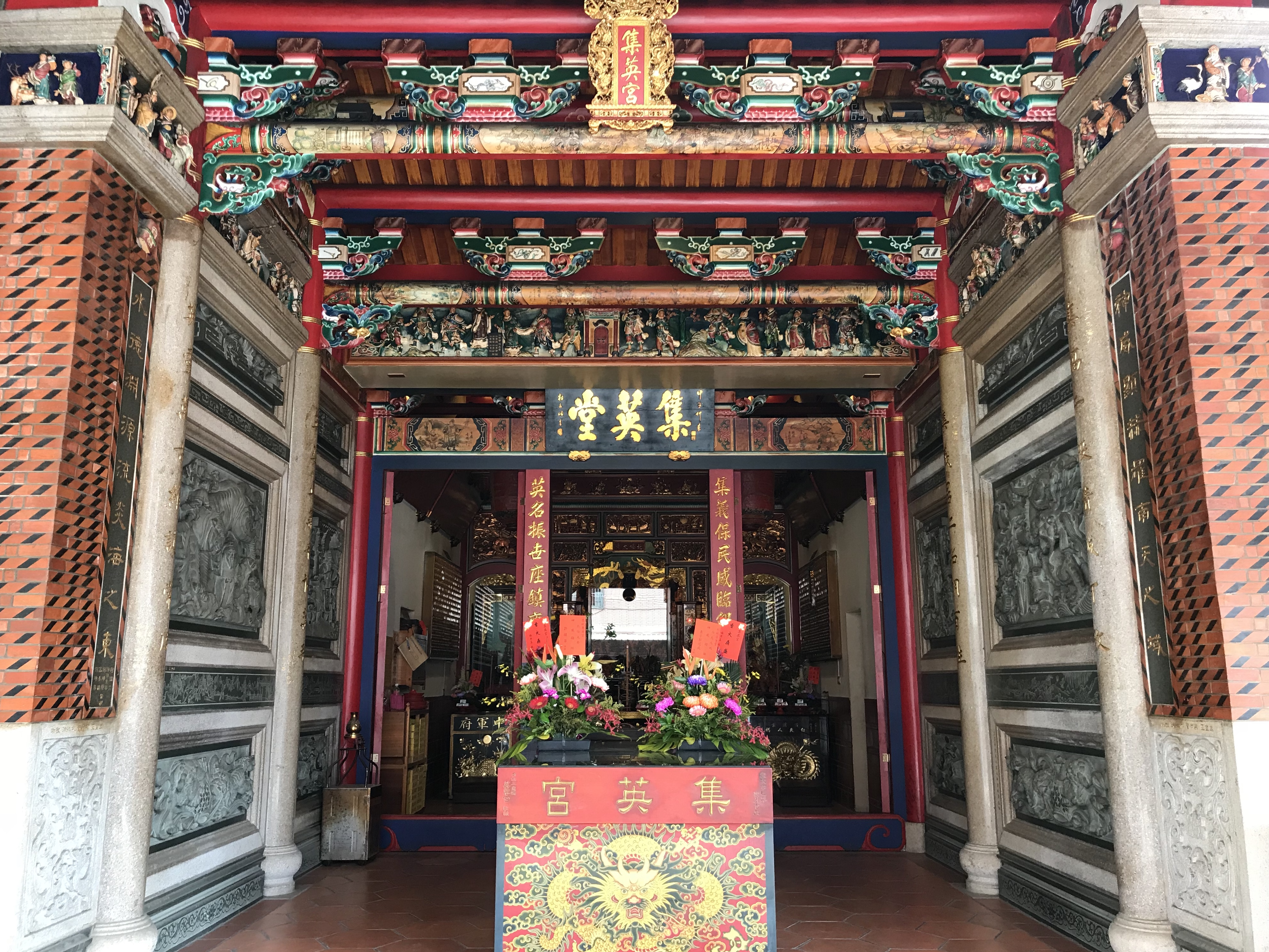 鹿港集英宮內部